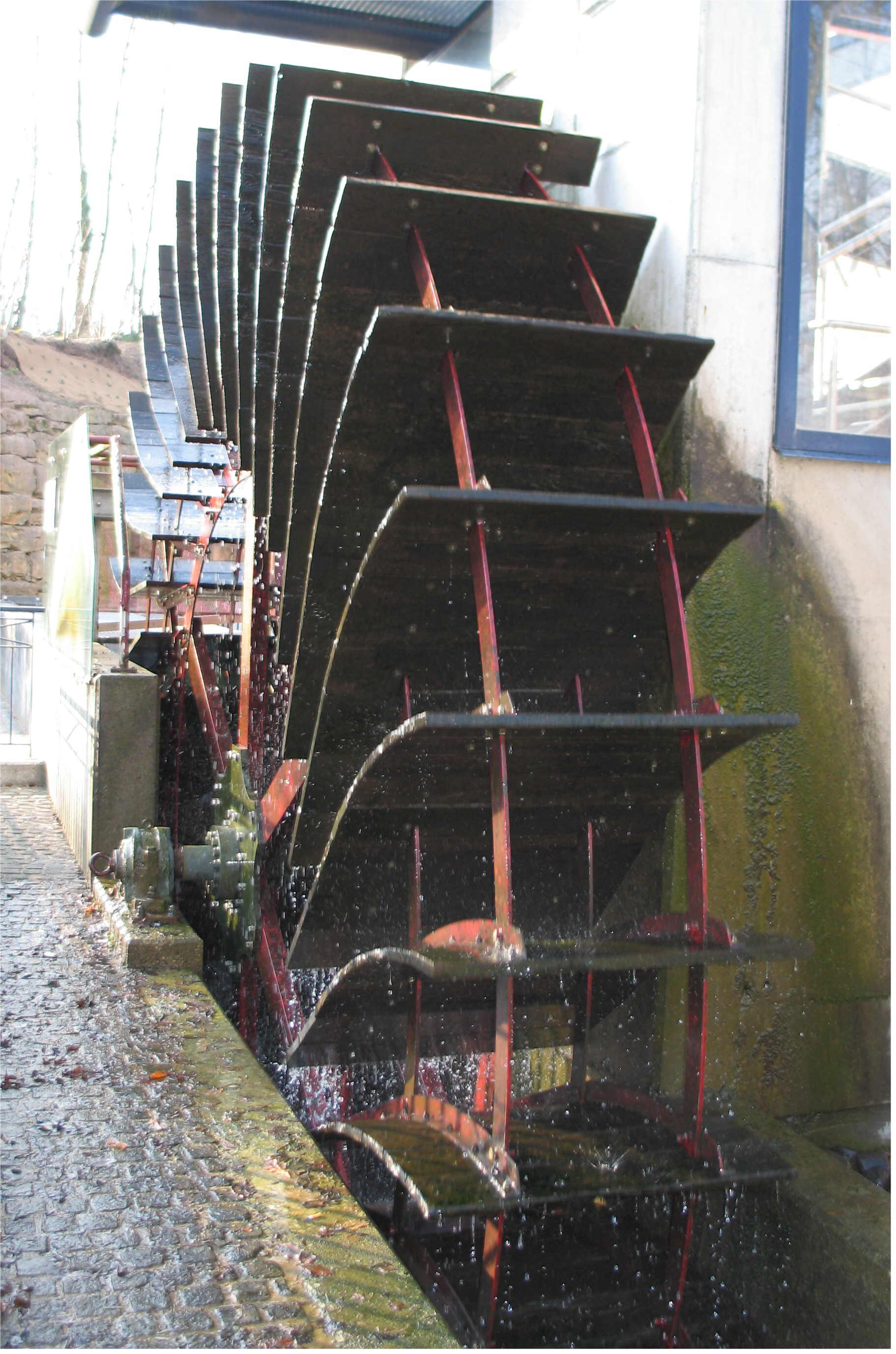 Waasserrad op der Fabrik am Préizerdaul.